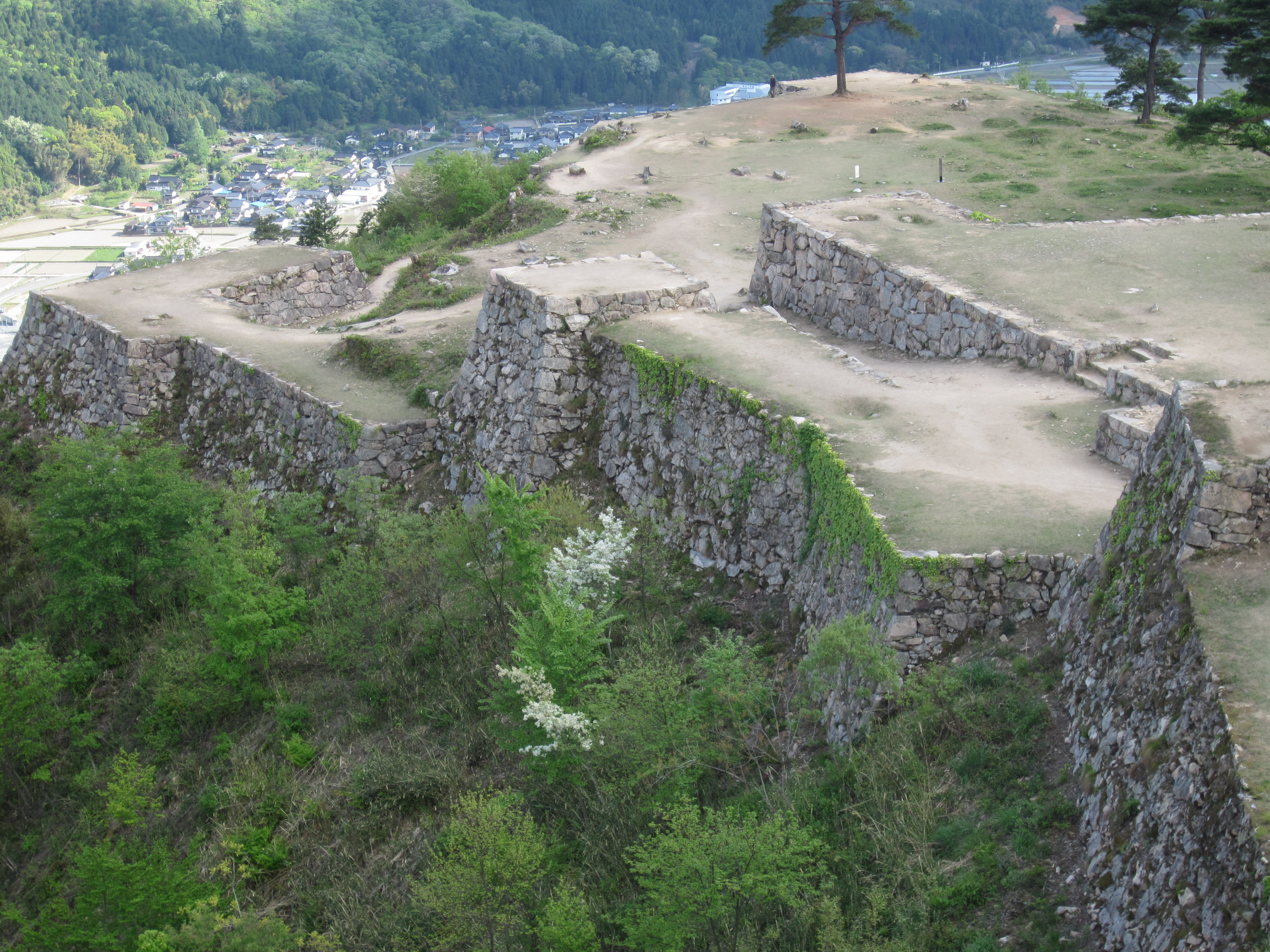 竹田城、南二の丸・南千畳